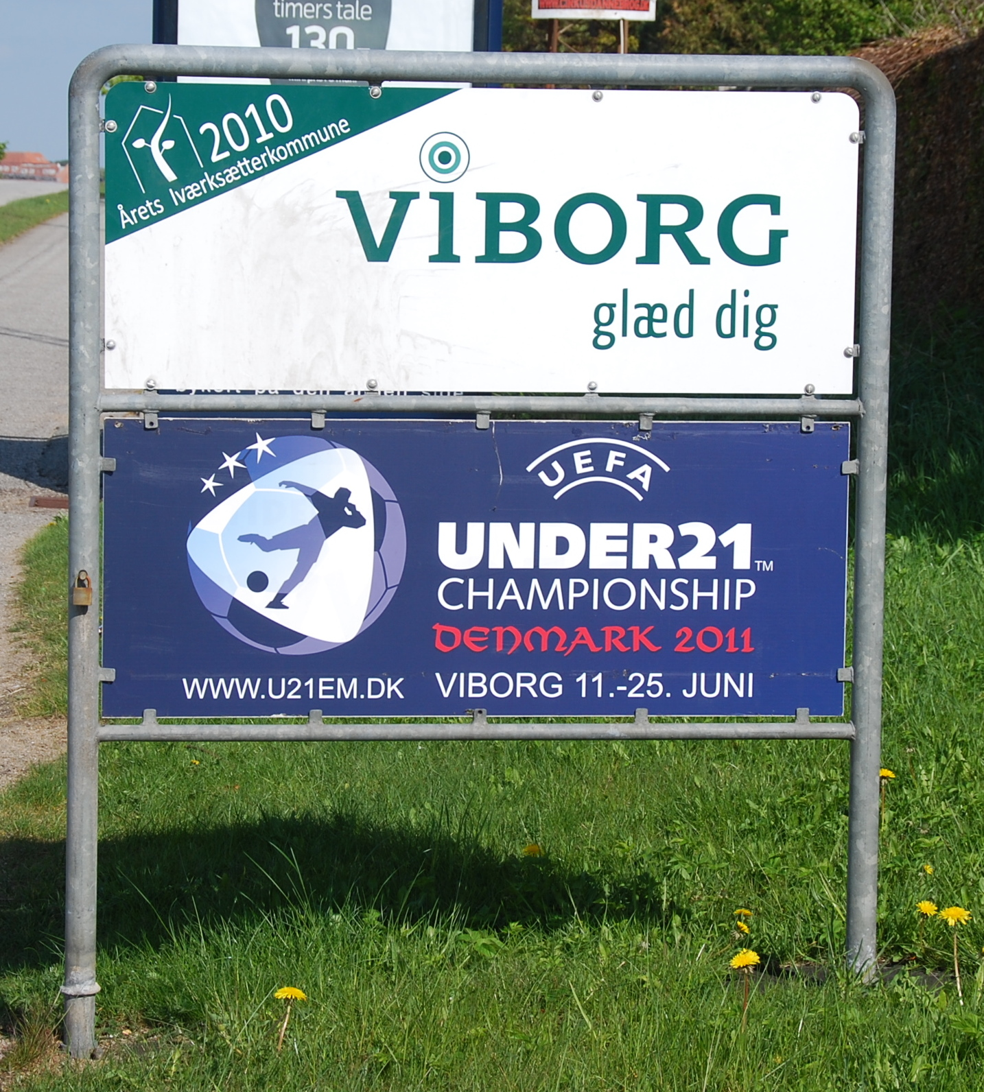 Skilt placeret på Holstebrovej i Viborg, Danmark. Her reklamerende for U-21 Europamesterskabet i fodbold 2011.